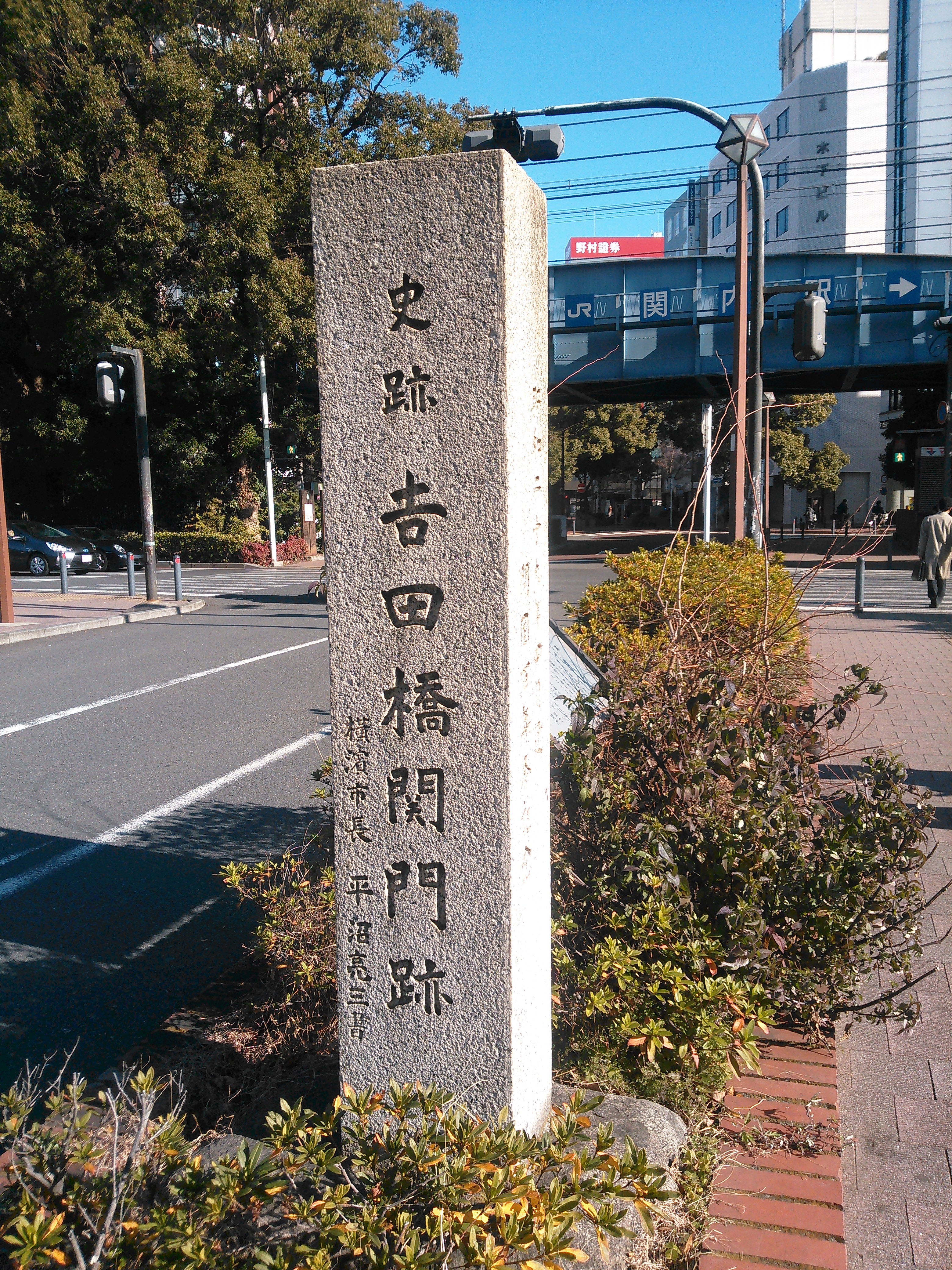 横浜市中区、吉田橋関門跡の碑